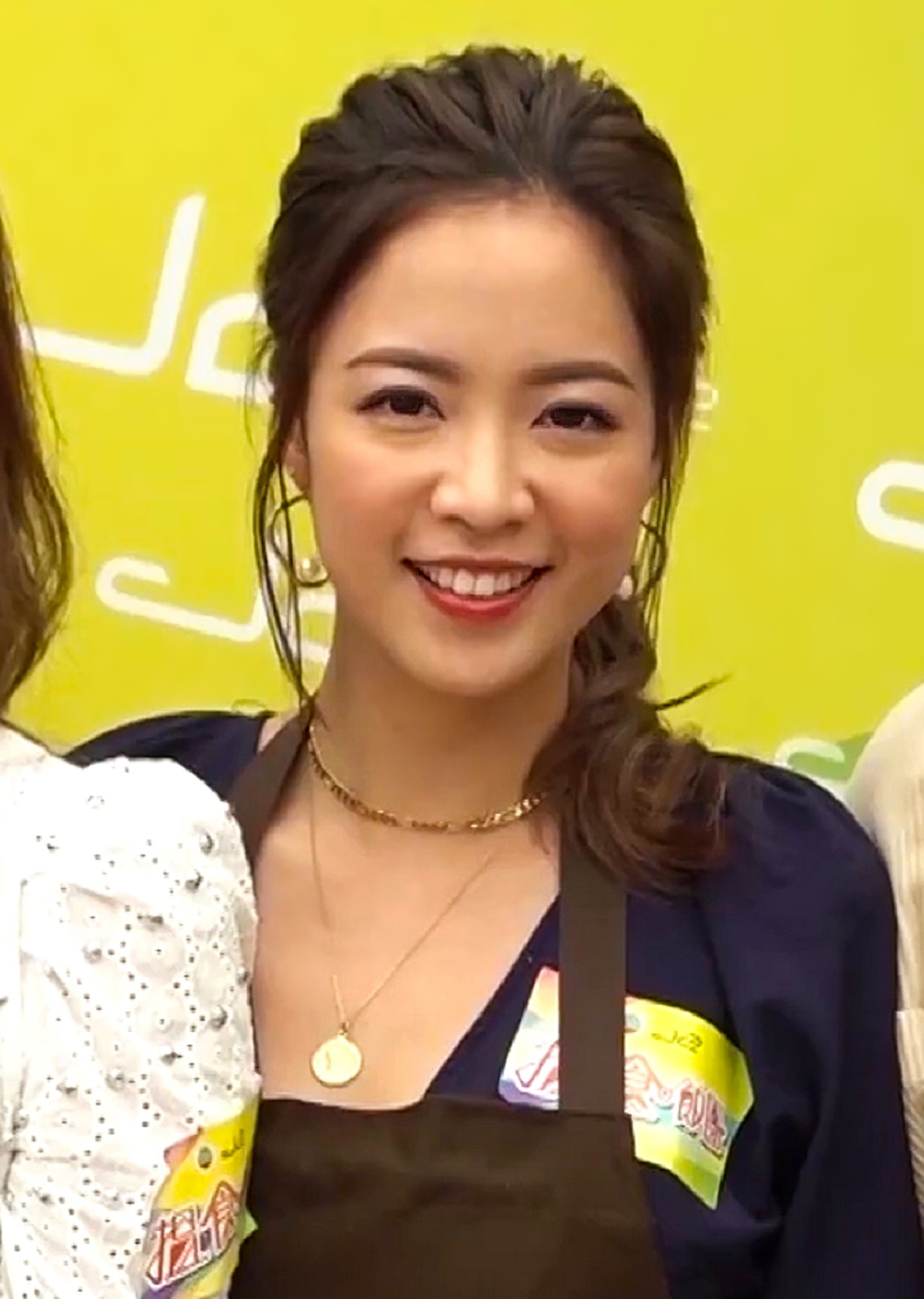 中文（香港）: J2節目《搵食飯團》記者會